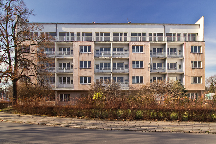 Dawny dom studencki "Pancernik" - elewacja wschodnia